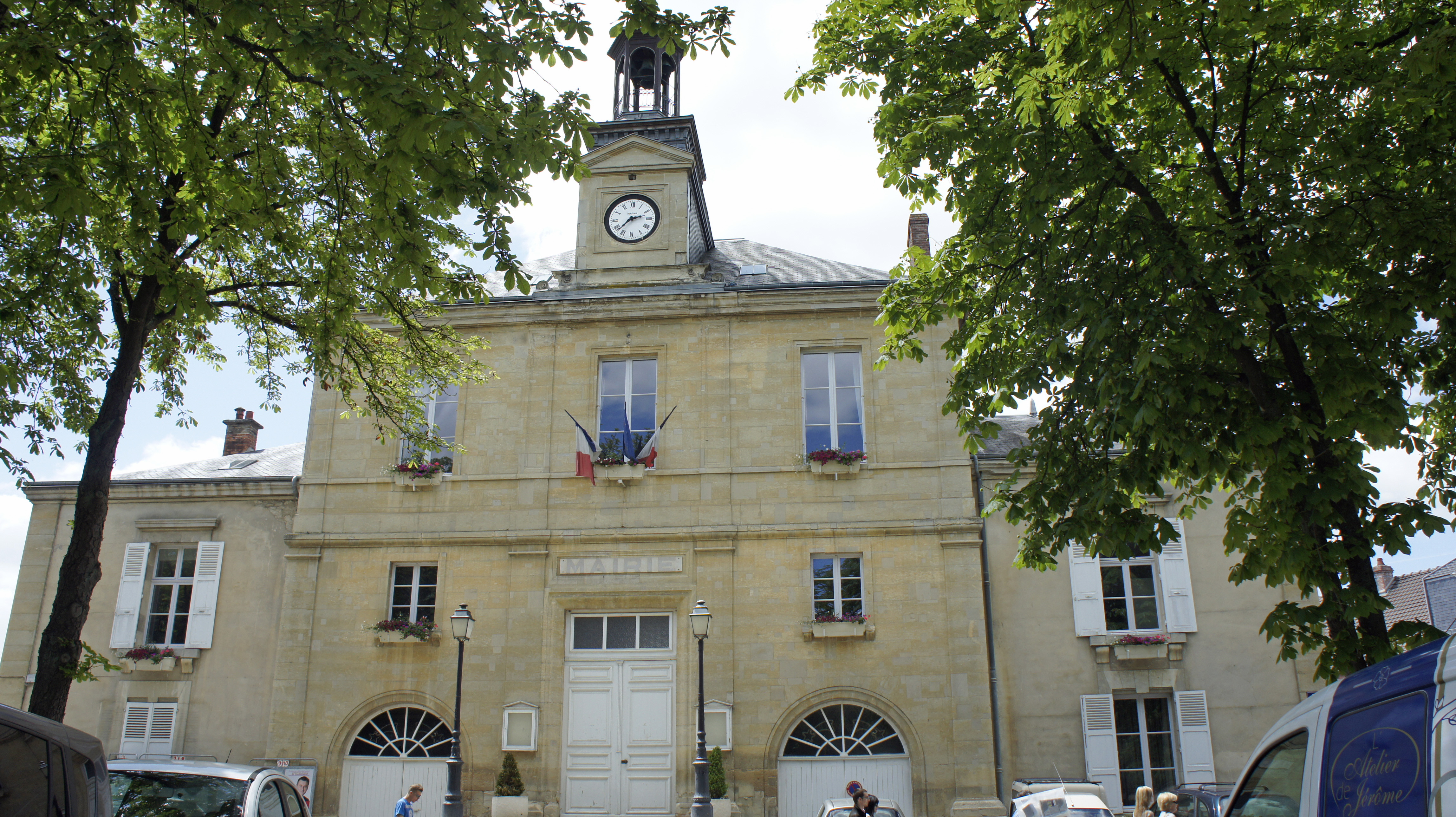 Mairie à Hermonville.